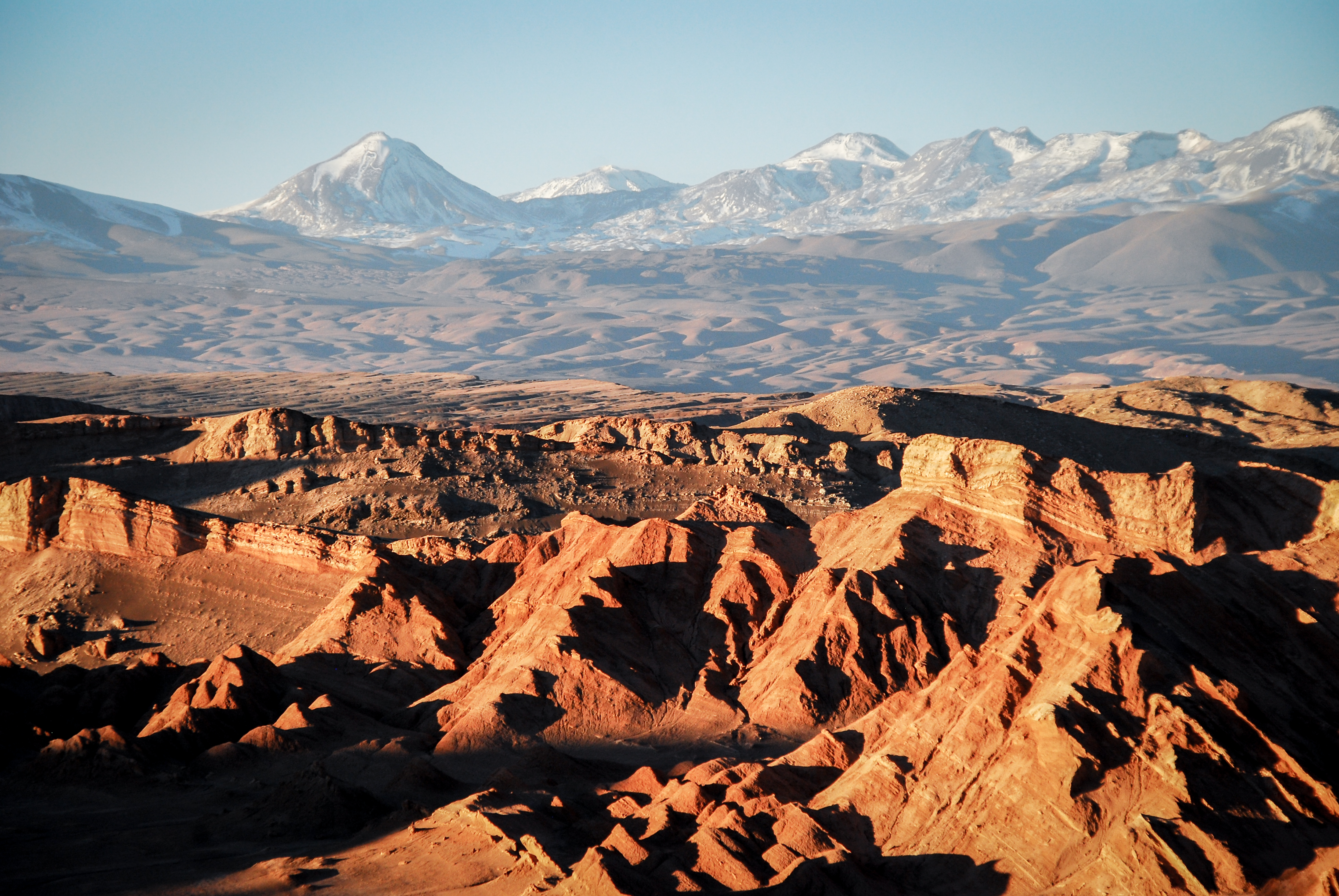 Vista desde el Valle de la Muerte hacia el nororiente